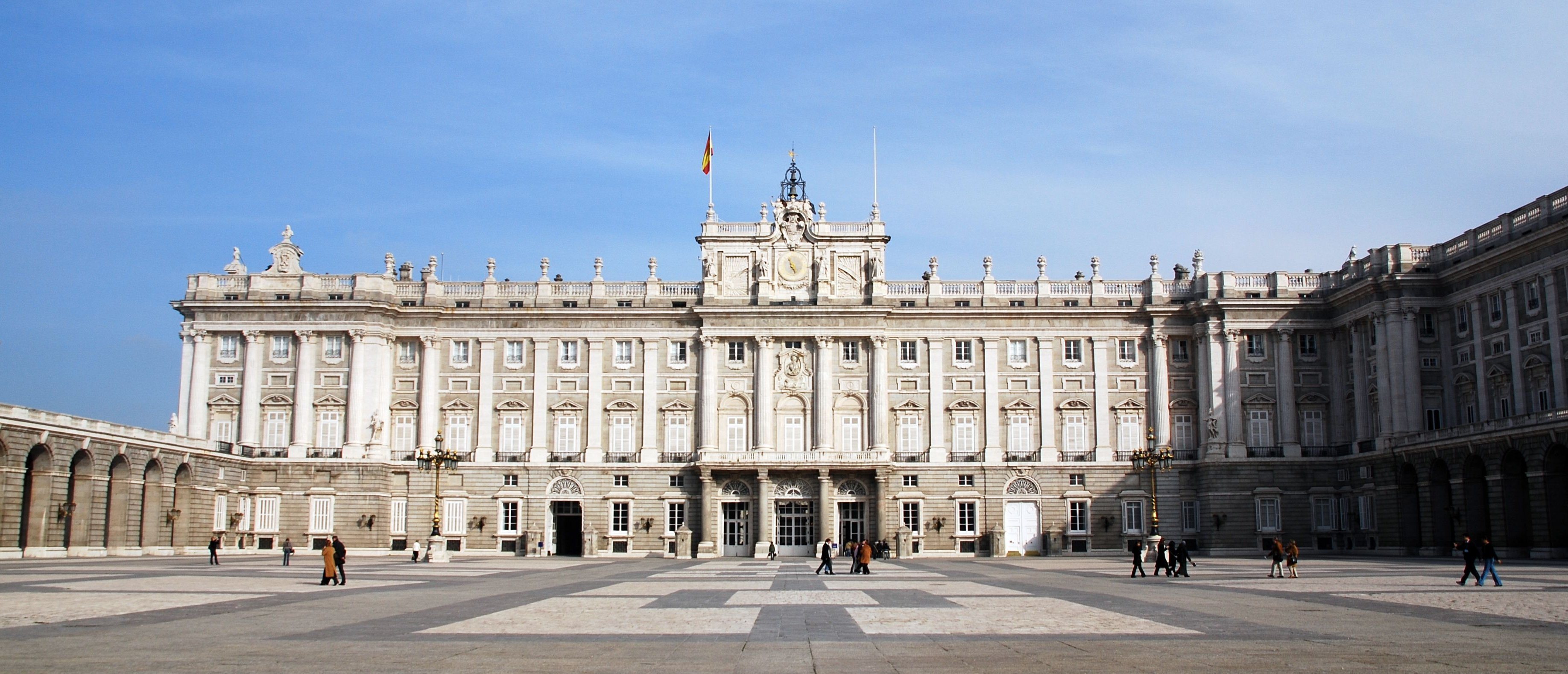 Palacio Real